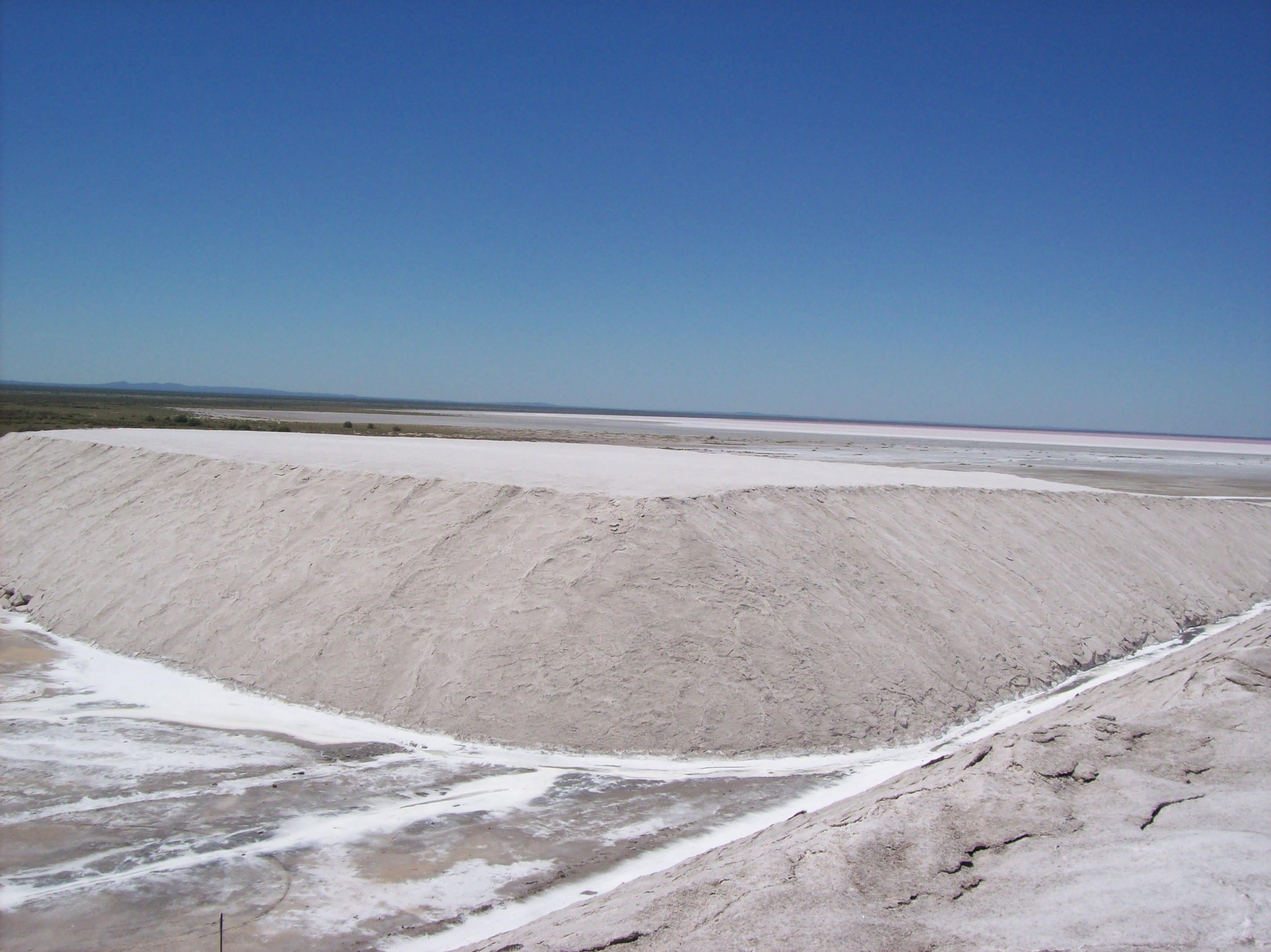 Montaña de sal en las Salinas del Bebedero en el Departamento Capital, Provincia de San Luis, Argentina.